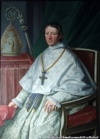 Jeroným Josef Zeidler